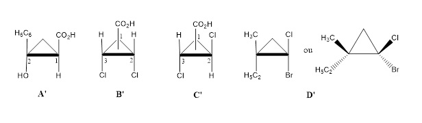 ciclopropanos tri e tetrasubstituidos